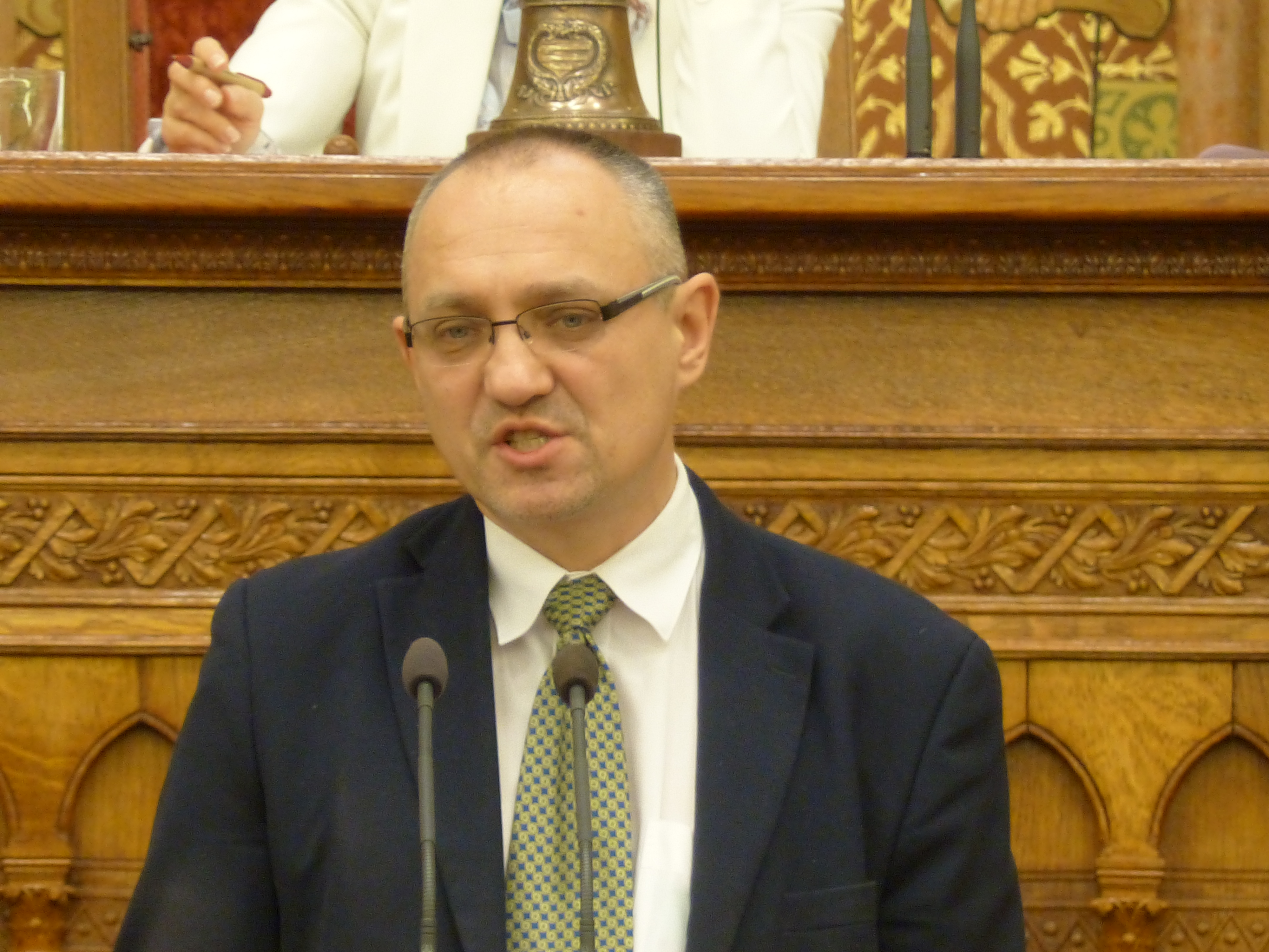 Marcin Zaremba (Lengyel Tudományos Akadémia) A háború utáni félelem rövid történeteː Lengyelország 1944 -1947 címmel tartott előadást a Felsőházban a Sztálin árnyékában - A szovjet modell exportja Kelet-Közép-Európában című konferencián.